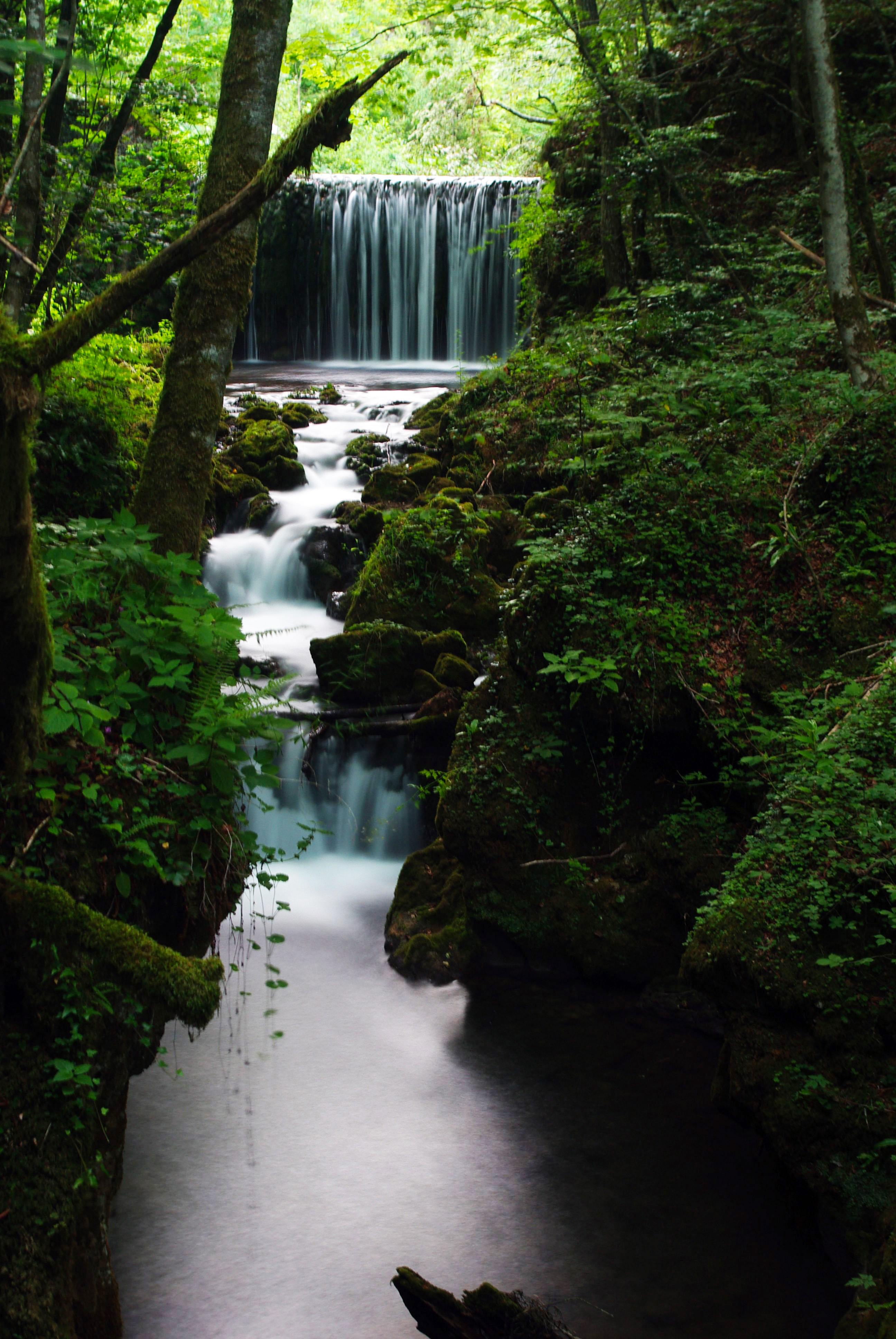 U dolini se ljepotom izdvaja Vranjački slap koji je optočen sedrom - "živom" stijenom koja i danas nastaje.